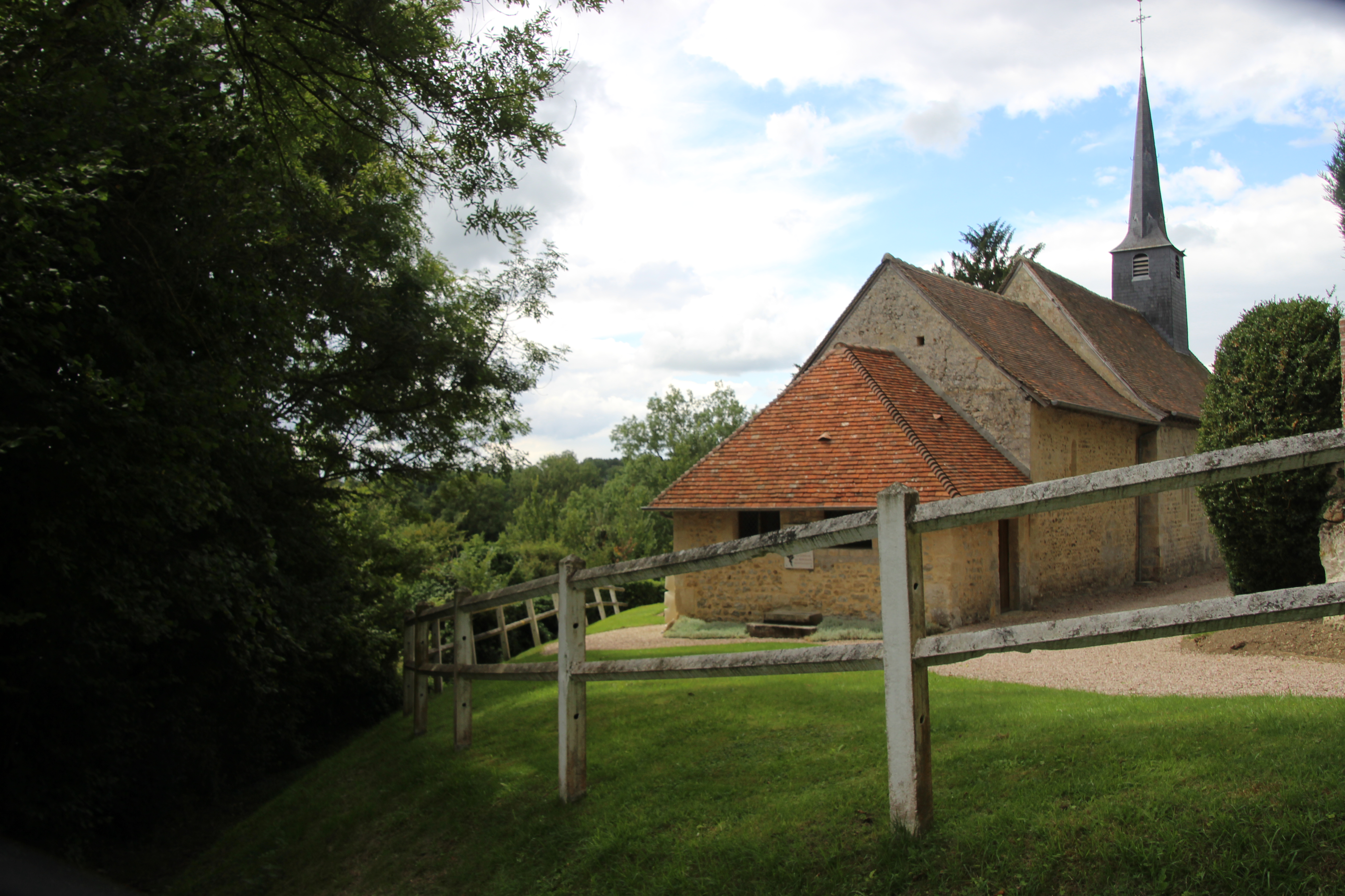 église Les Monceaux